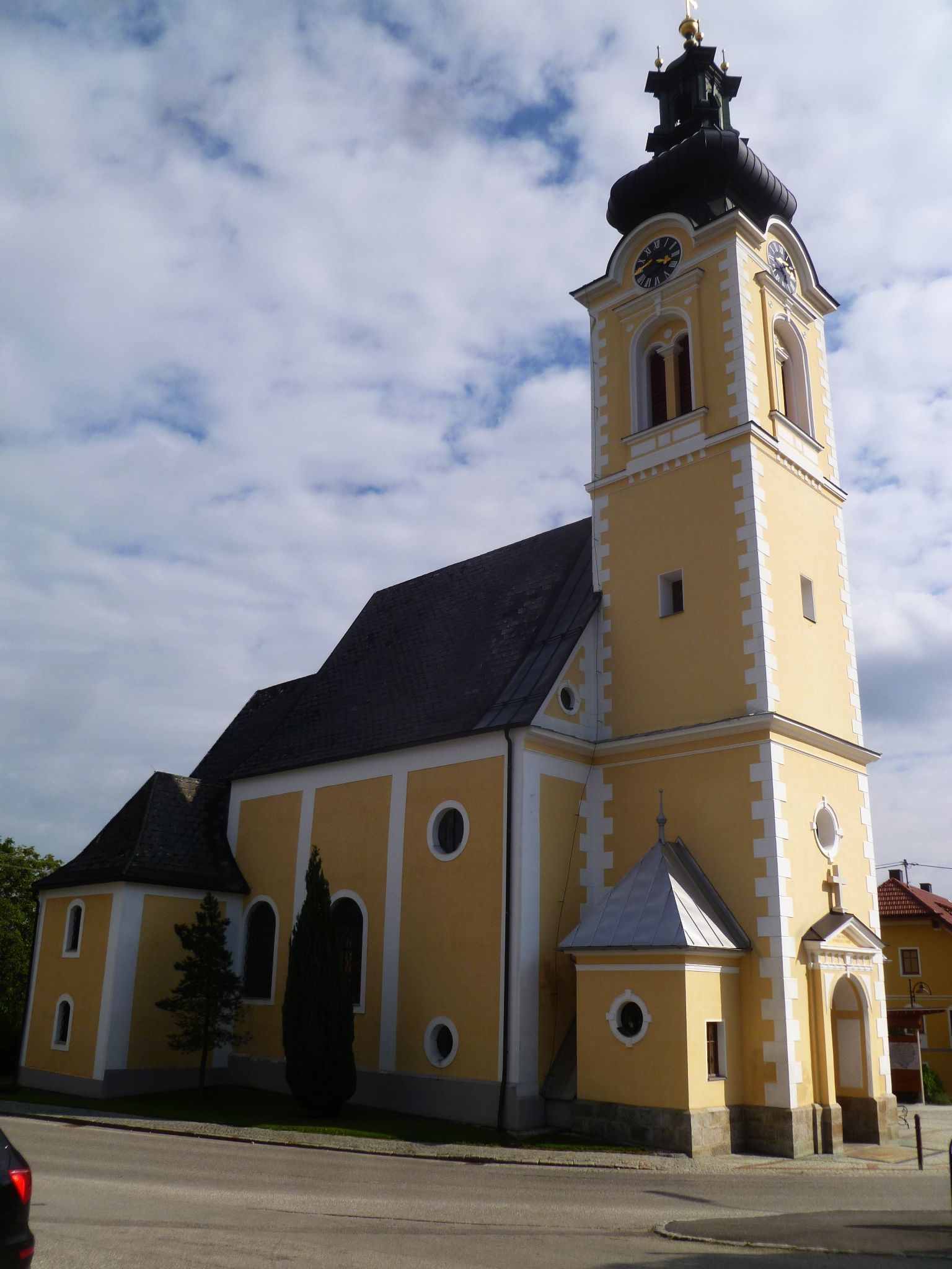 Kath. Filialkirche hl. Koloman